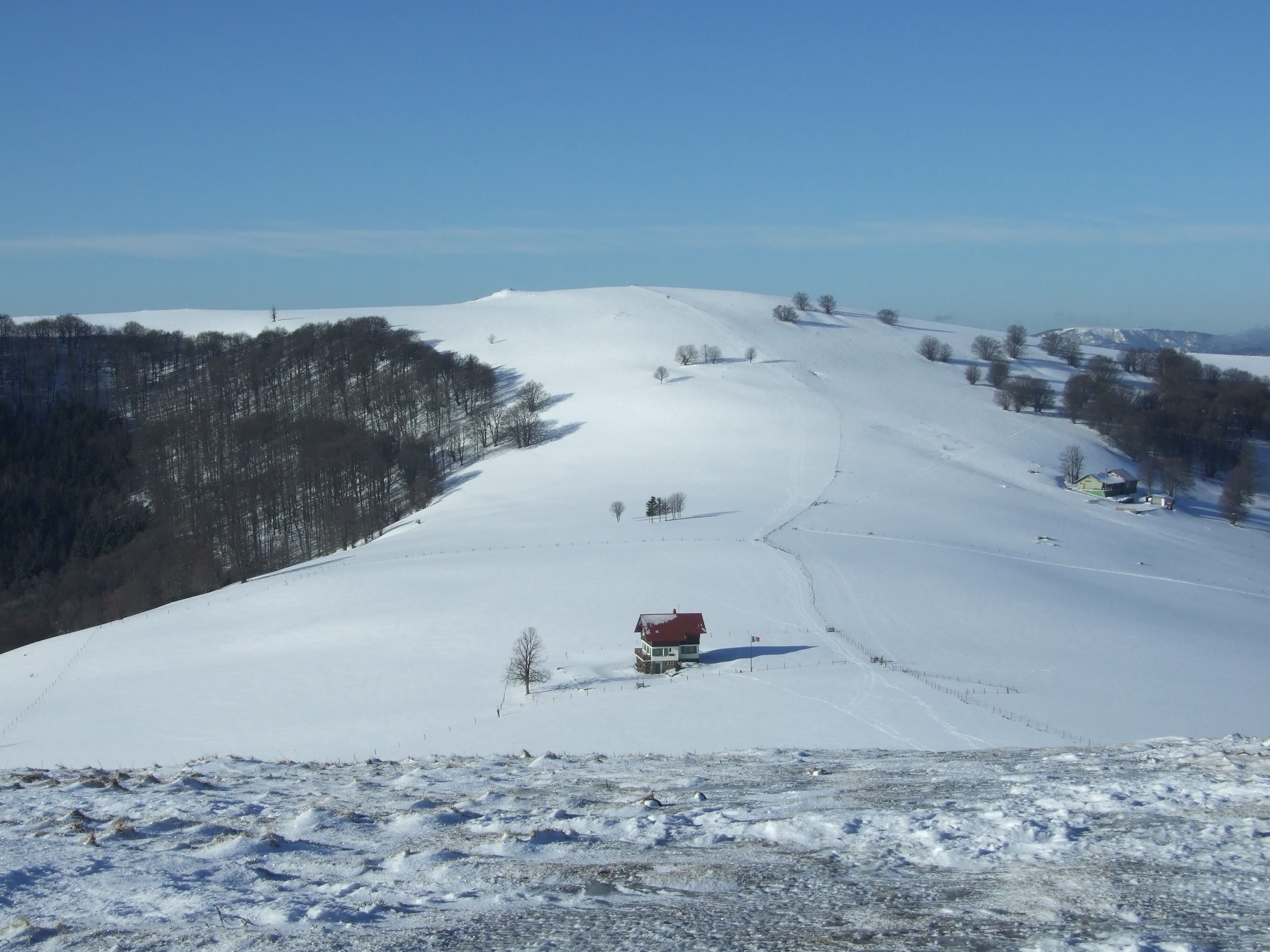 Le sommet du Rossberg, le refuge du Ski Club Mulhousien et le refuge du Ski Club Rossberg(centre), à la Waldmatt.